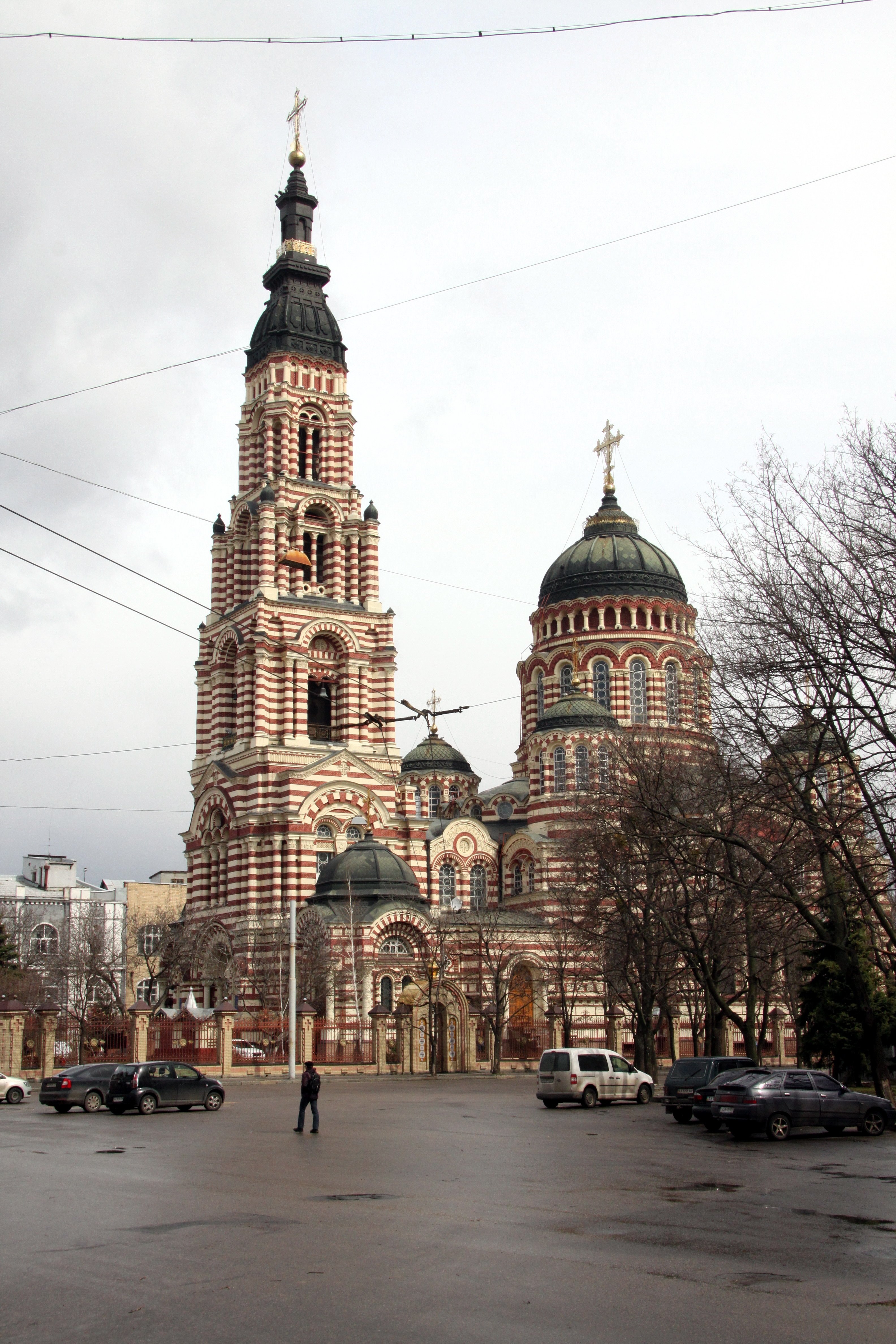 Благовіщенський собор, вул. Енгельса, 12, Харків